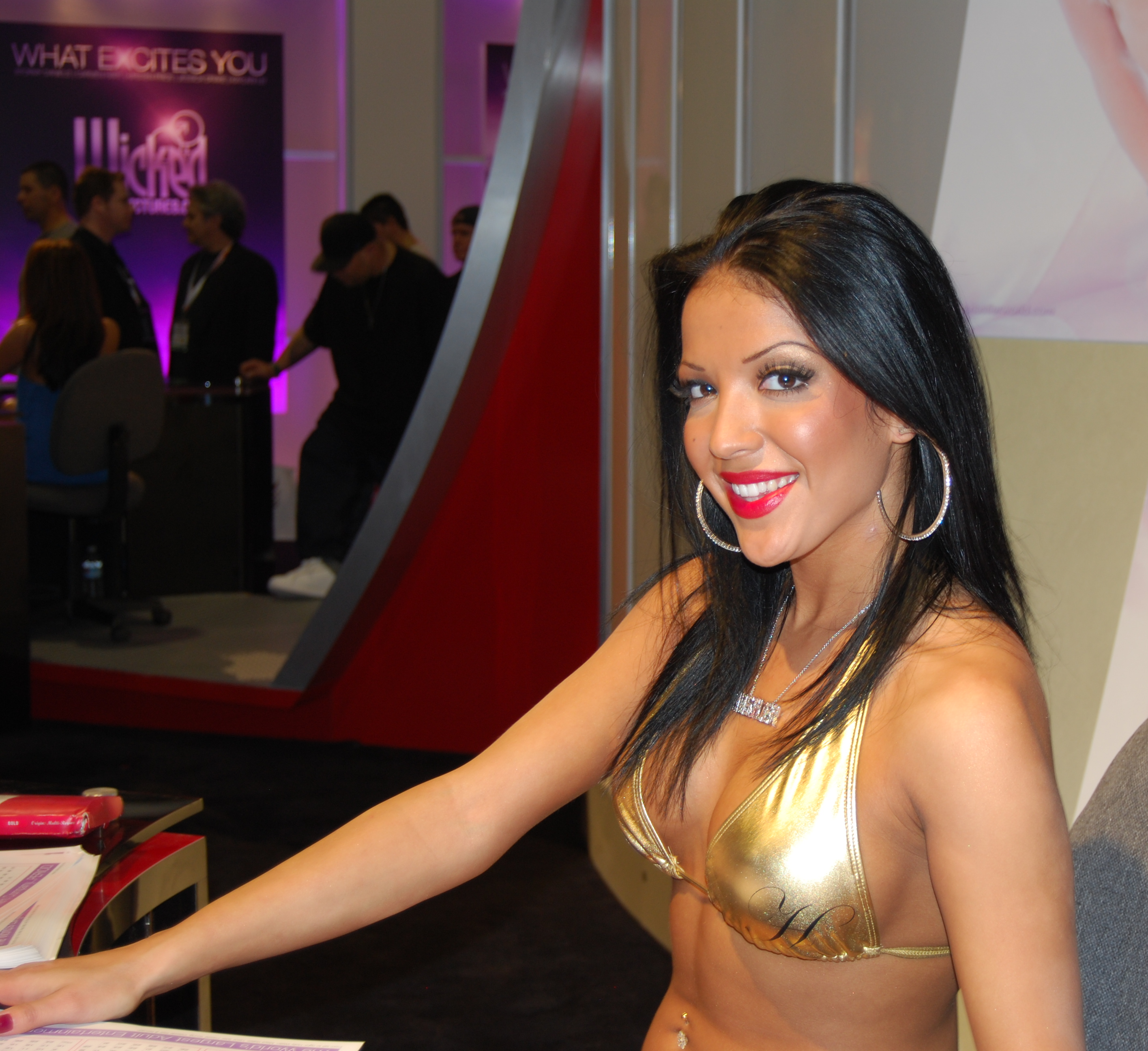 AEE2008_Nikon_Day2 448